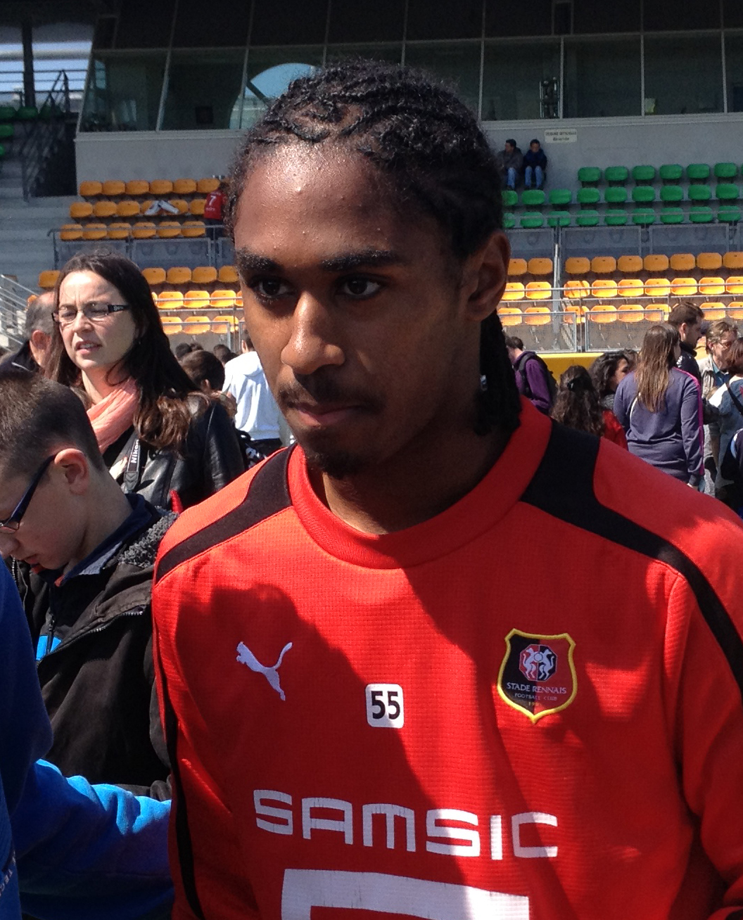 Photo prise lors d'un entraînement du Stade rennais au stade de Marville de Saint-Malo le 3 mai 2013. Wesley Saïd répond aux sollicitations des supporters.